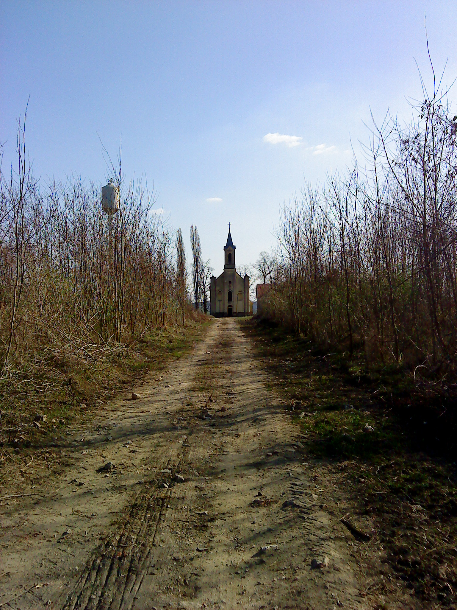 Garéi Nagyboldogasszony római katolikus templom a misés útról